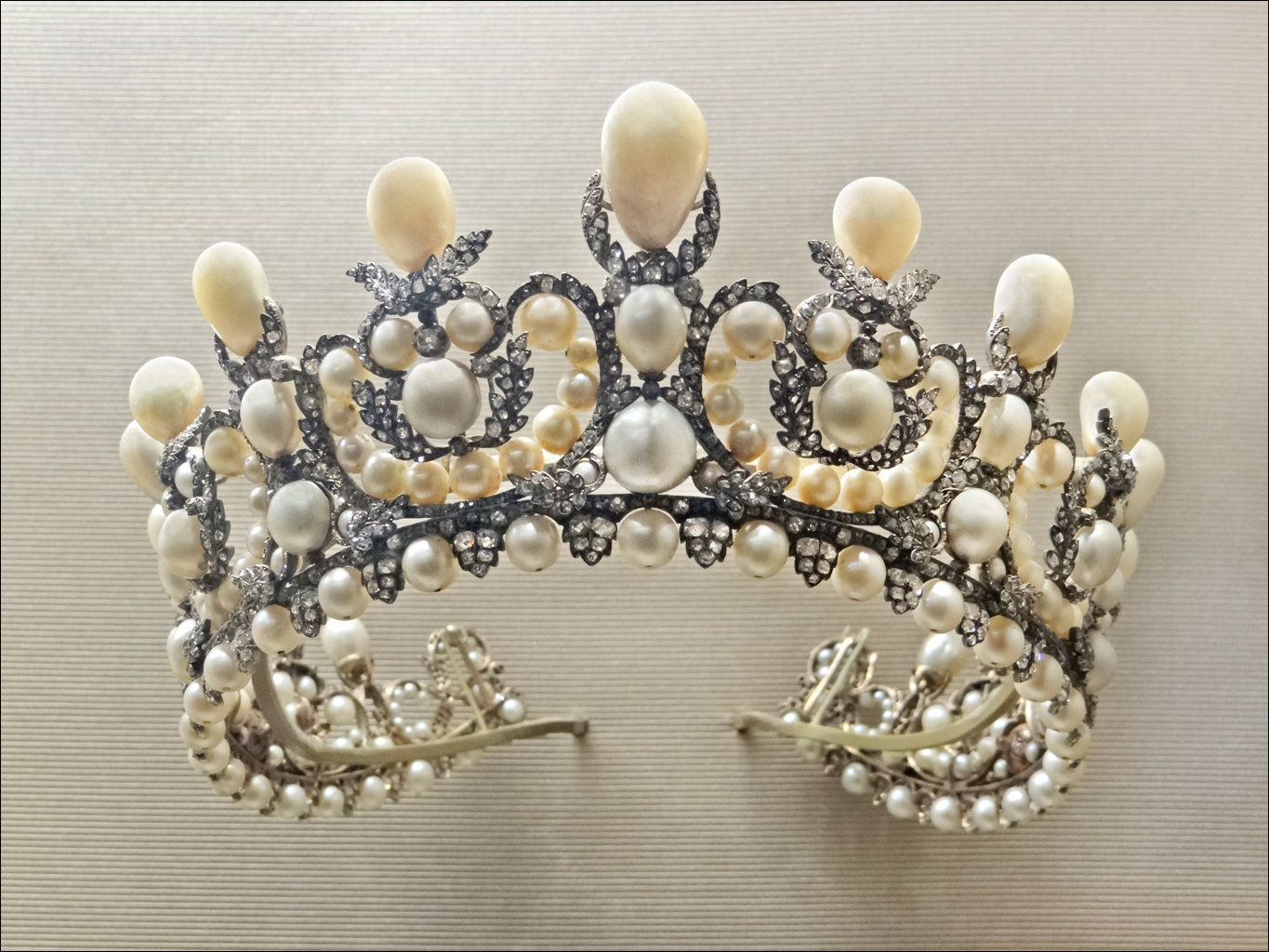 Diadème de l'Impératrice Eugénie créé à la suite de son mariage avec Napoléon III, le 29 janvier 1853. Le diadème comporte 212 perles et 1998 diamants de taille ancienne, montés sur argent doublé d'or